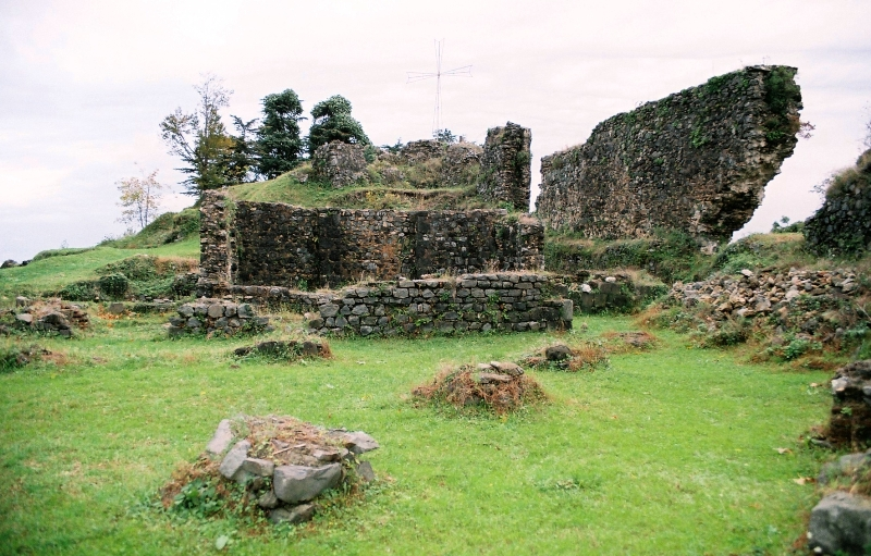 პეტრა. ციხისძირი